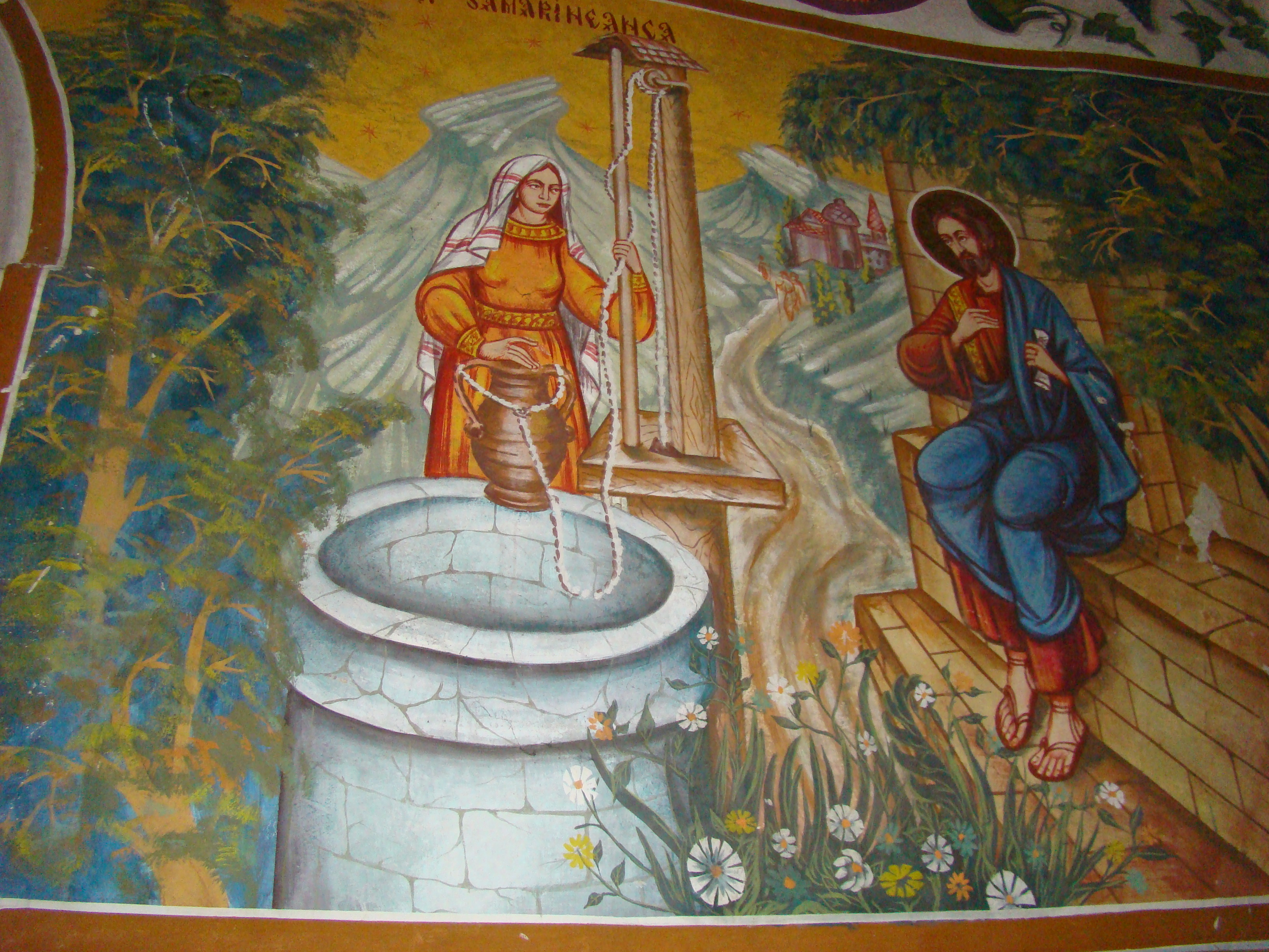 Biserica „Înălțarea Sfintei Cruci” din satul Mănăstirea, județul Cluj